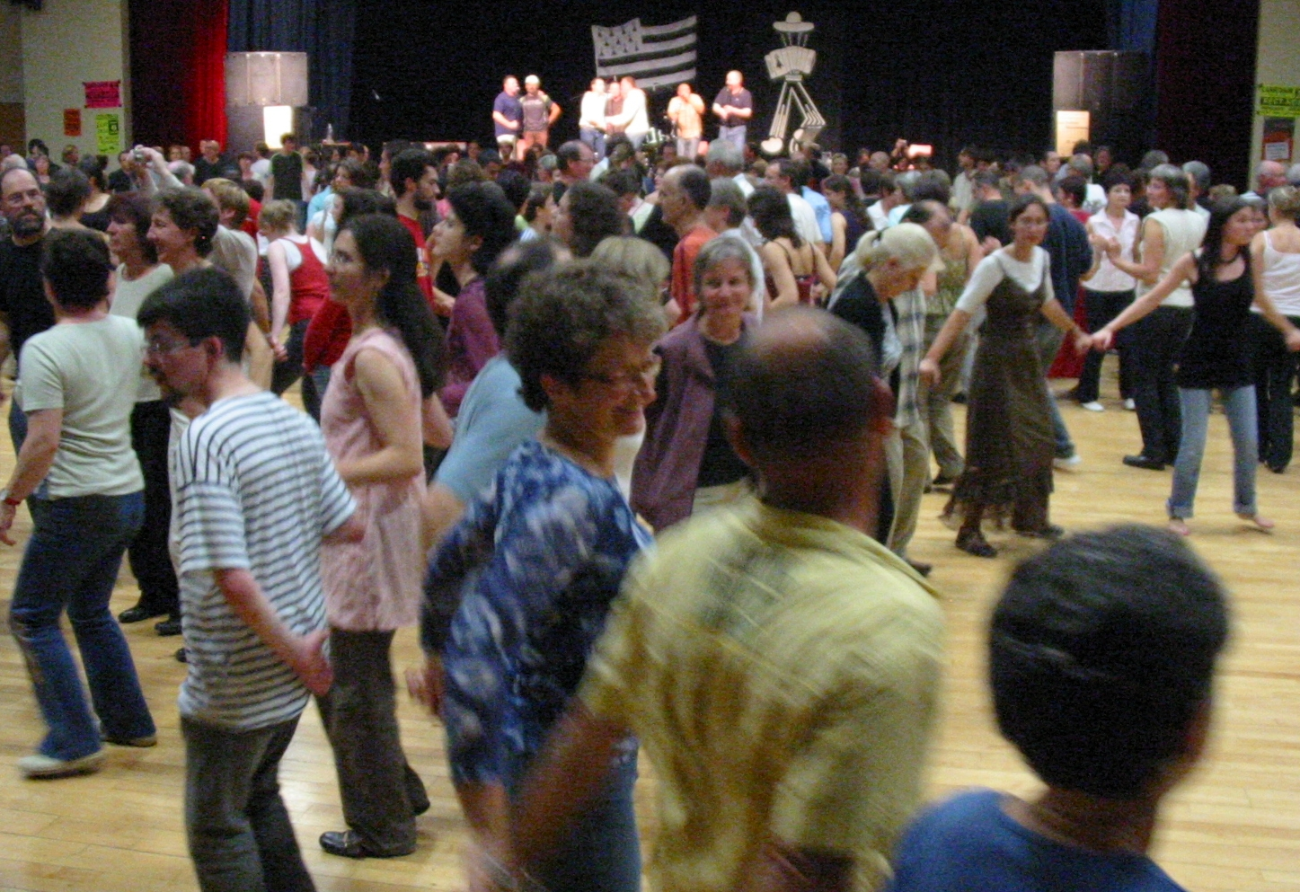 Fest noz à la Fête Mill Góll en Pays Gallo 2007